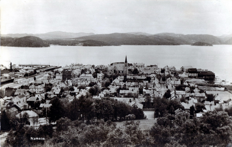 Namsos sentrum sett fra byfjellet Klompen ca 1936 Orginalfoto eier: Geir Tore Mjønes